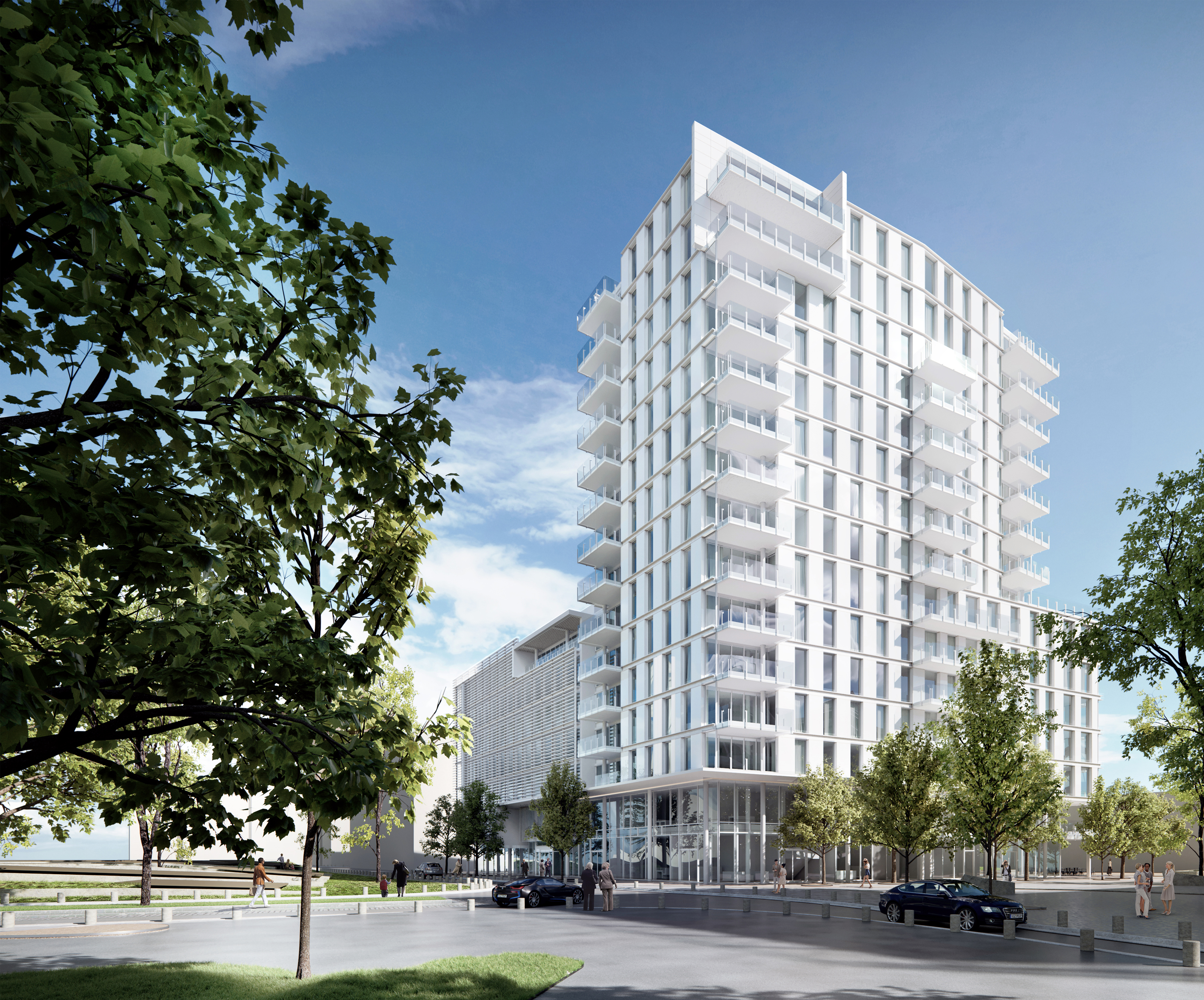 Engel & Völkers Unternehmenszentrale in Hamburg, Deutschland